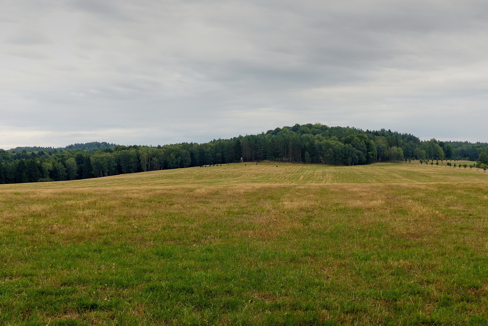 Svébořický Špičák (vpravo) a Lanův kopec od Brady.